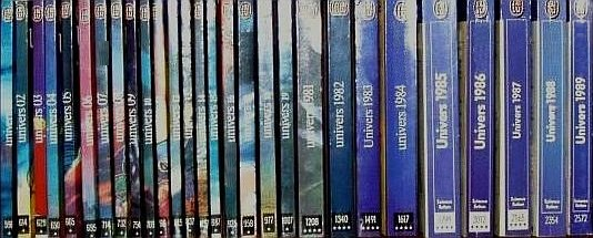 Anthologies françaises 'Univers' J'Ai Lu (intégrale).